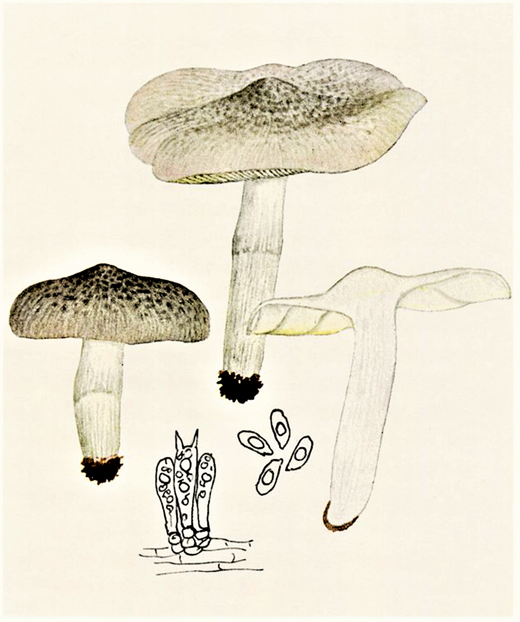 Giacomo Bresadola: Tricholoma scalpturatum (Fr., 1838) Quél. (1872)